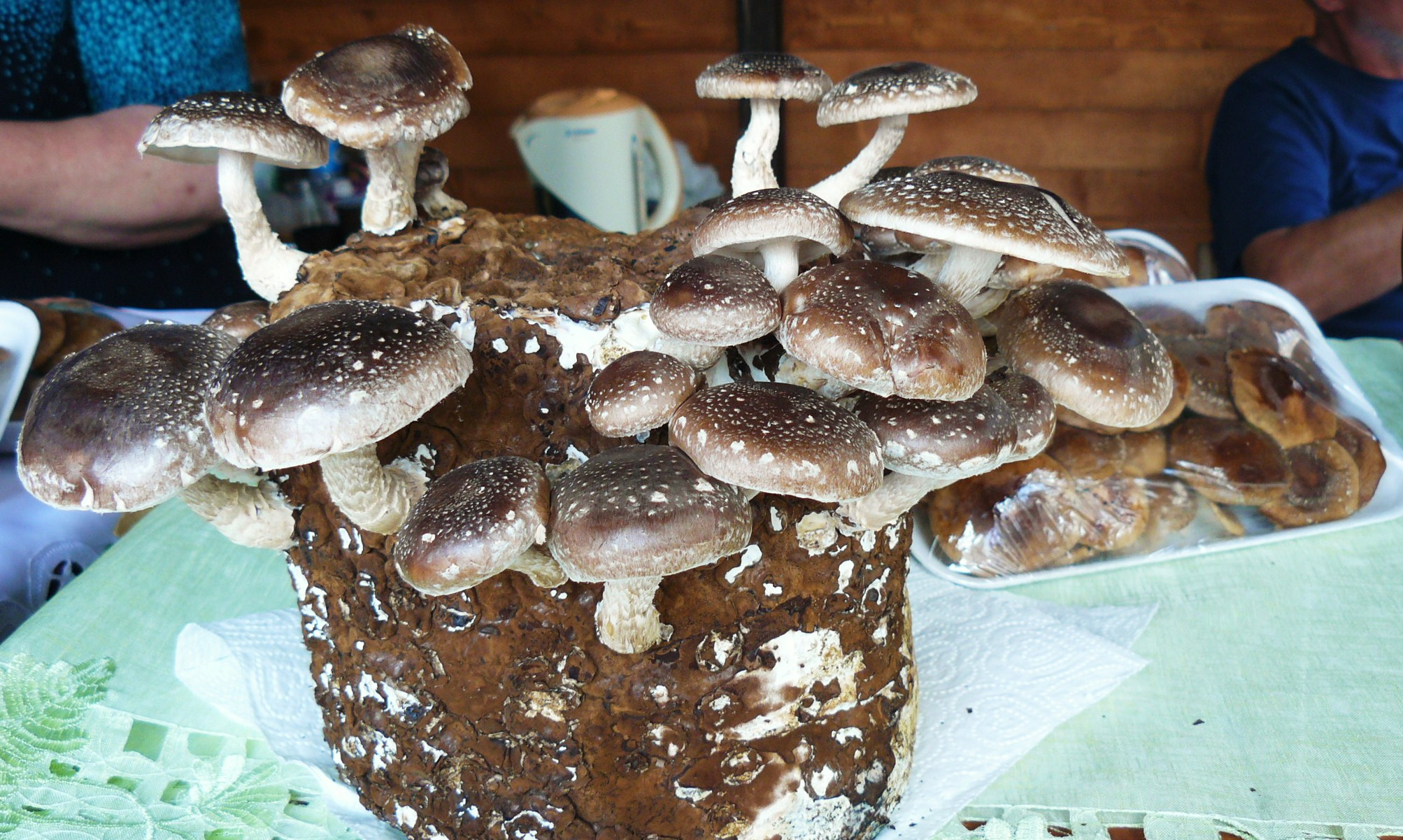 Festiwal Dobrego Smaku 2014, Poznań, Stary Rynek.